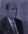 Filósofo y sociólogo español.